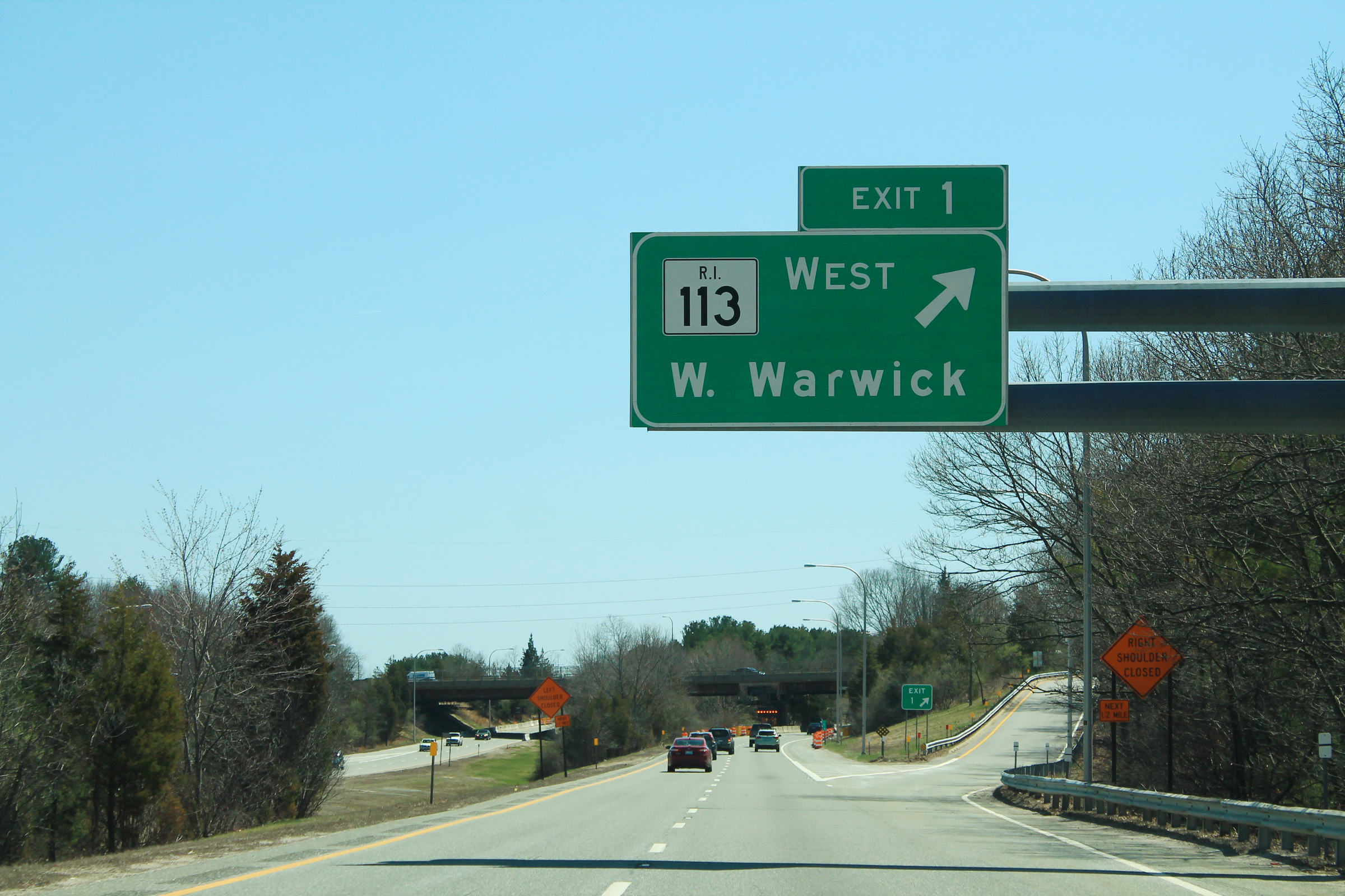 Int295sRoadRI-Exit-RI113